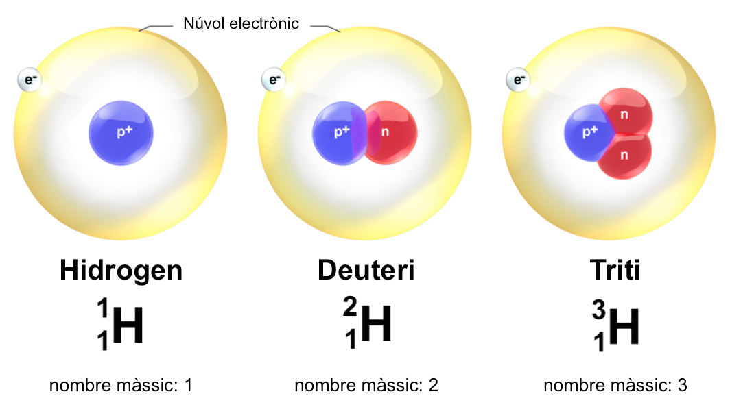 Imatge descriptiva dels 3 isòtops de l'hidrogen: hidrogen, deuteri i triti.